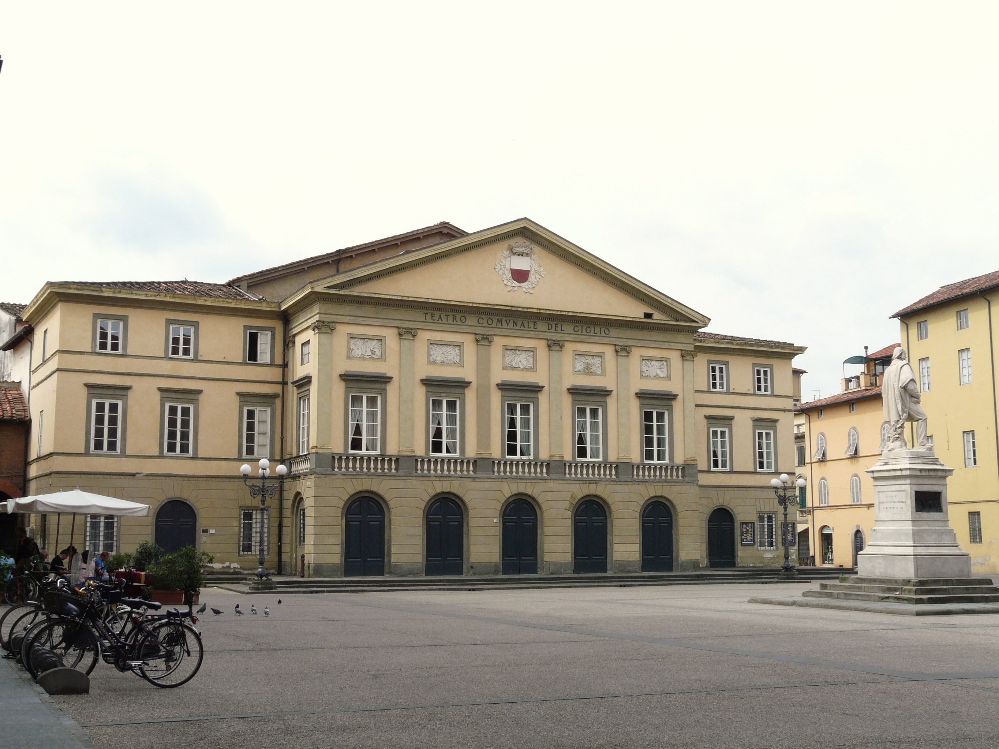 Teatro del Giglio, Comune di Lucca, Toscana, Italia